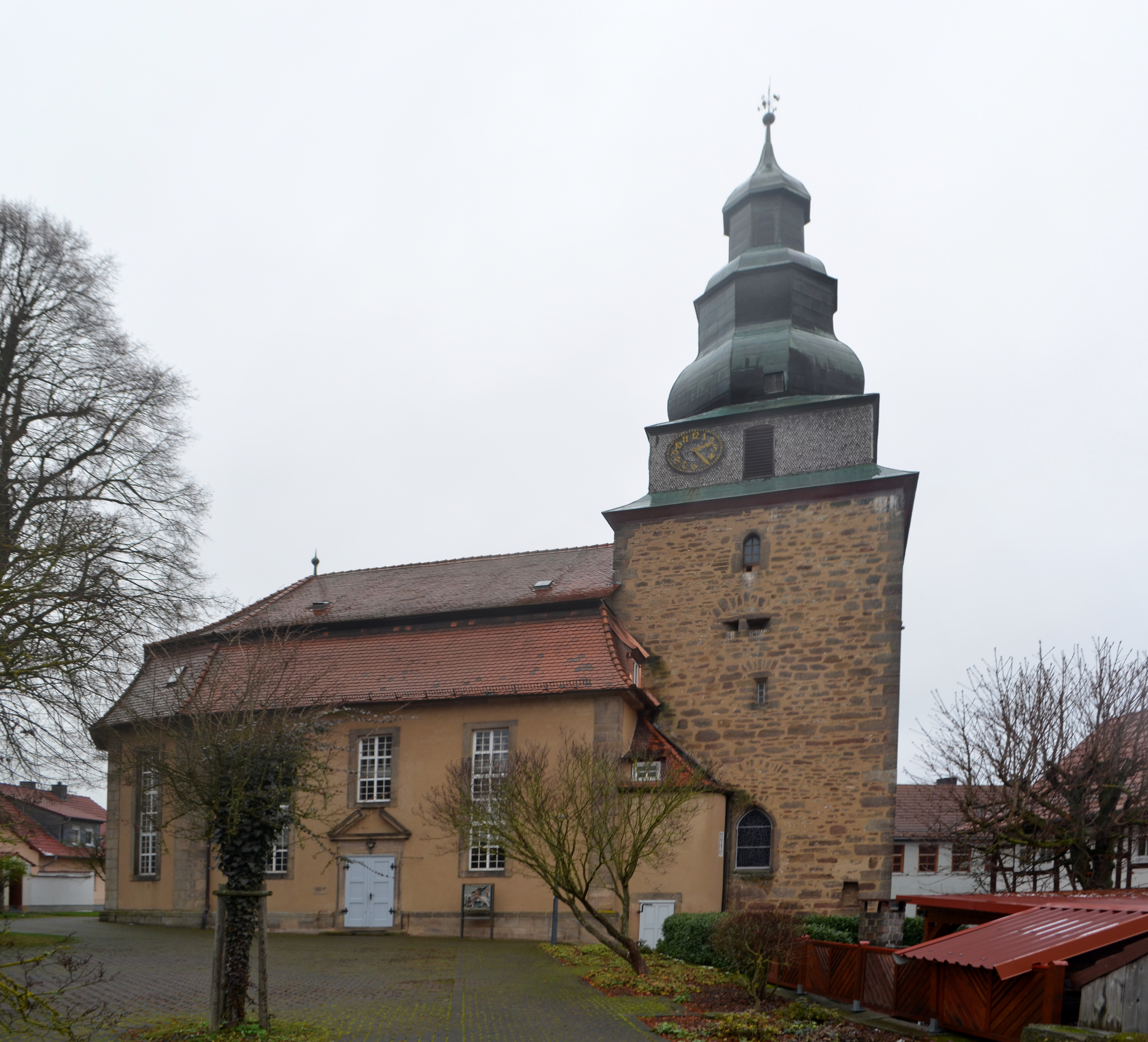 Schenklengsfeld, St. Mauritius